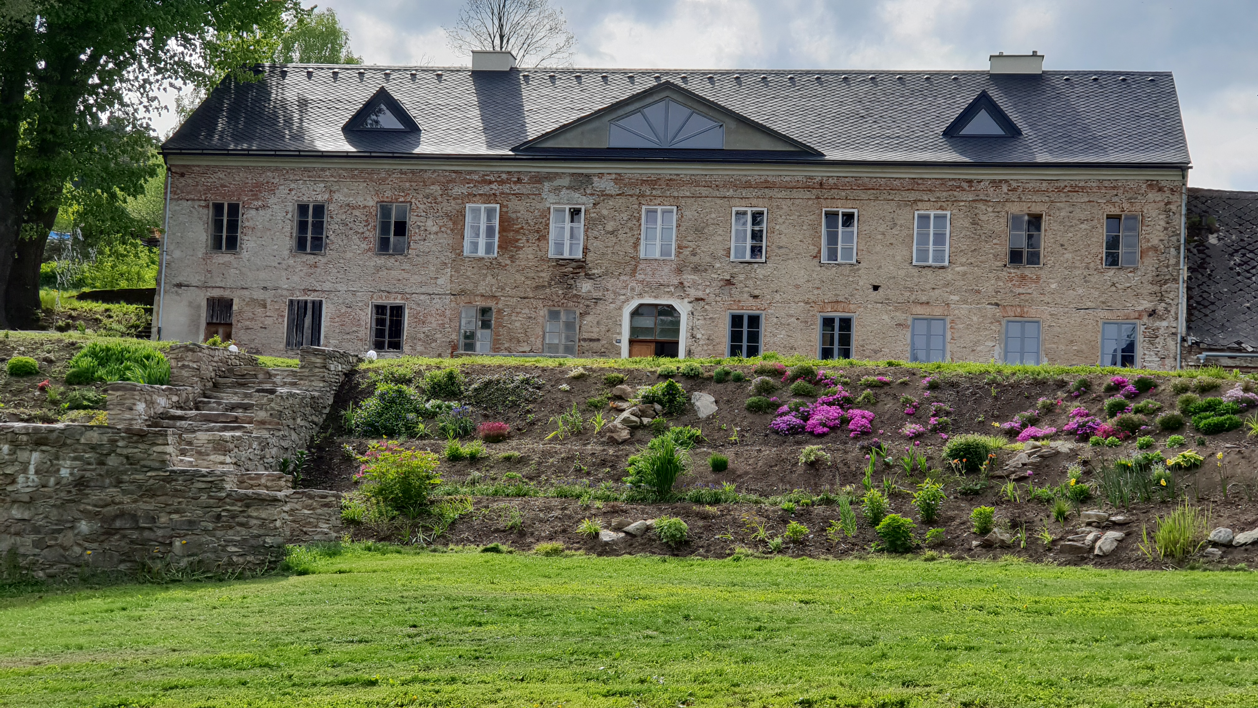 Zámek Palvínov